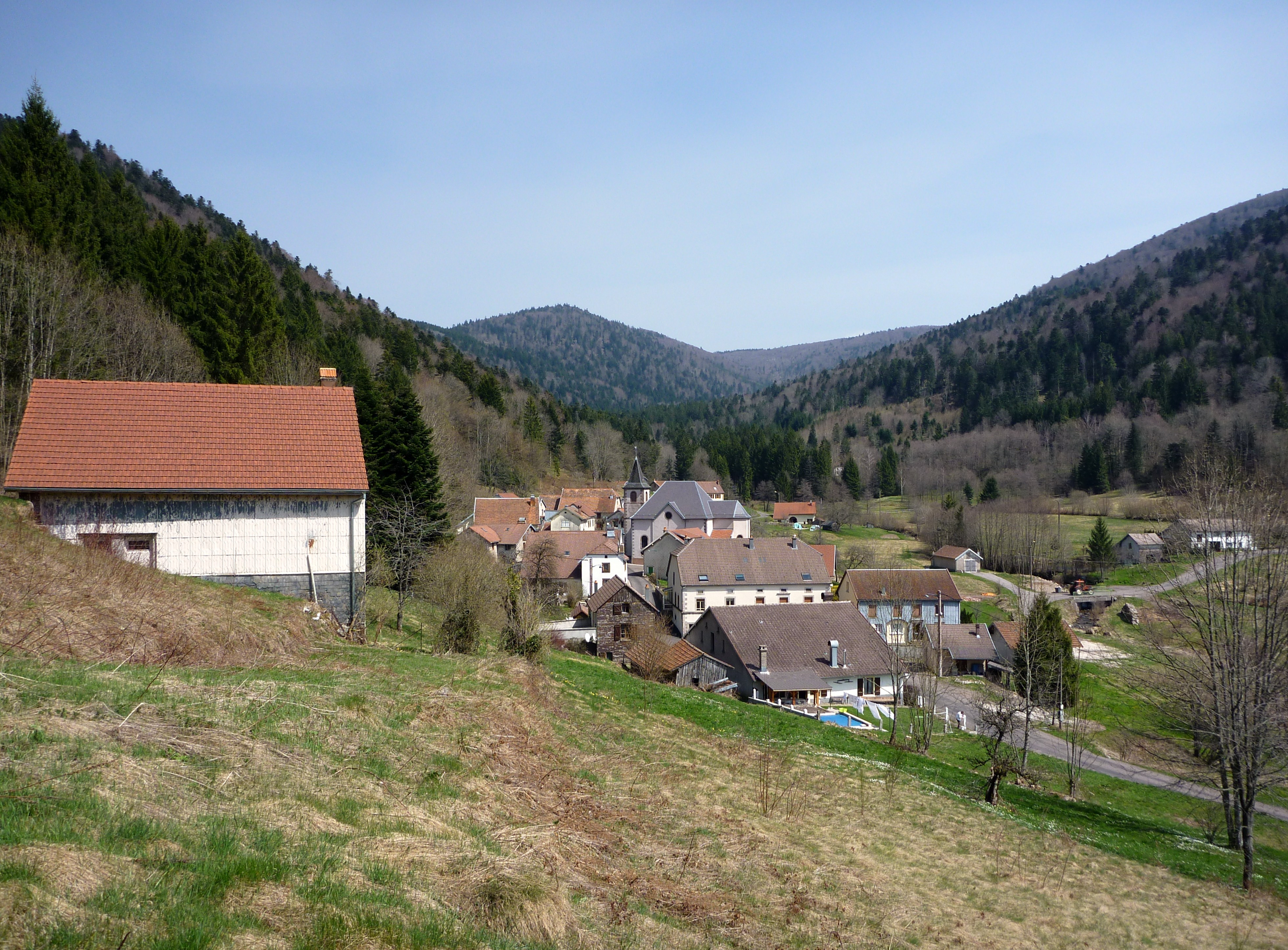 Vue sur Miellin.